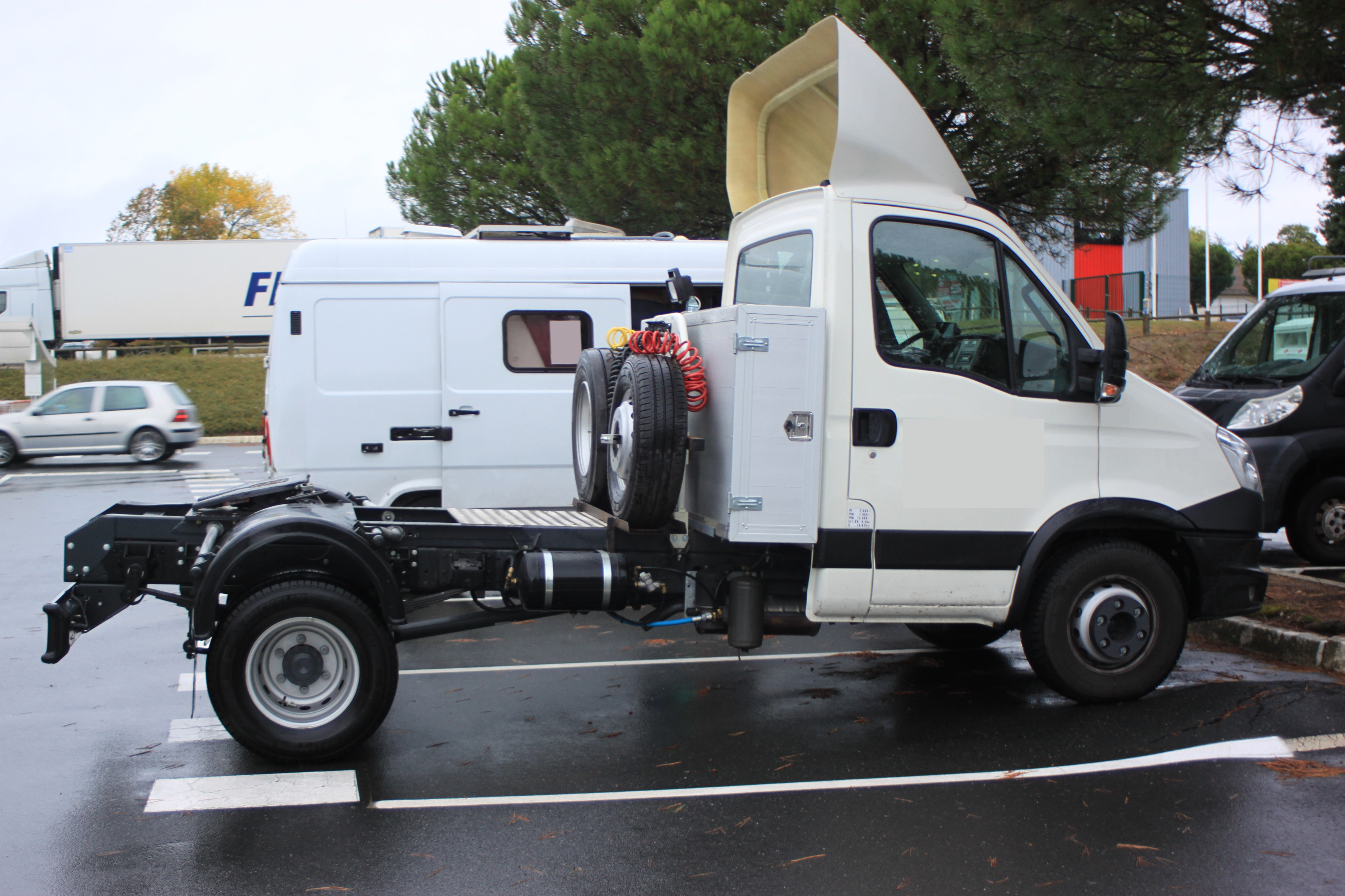 Tracteur Iveco Daily (PV : 2t6 ; PTAC : 7t ; PTRA : 12t).